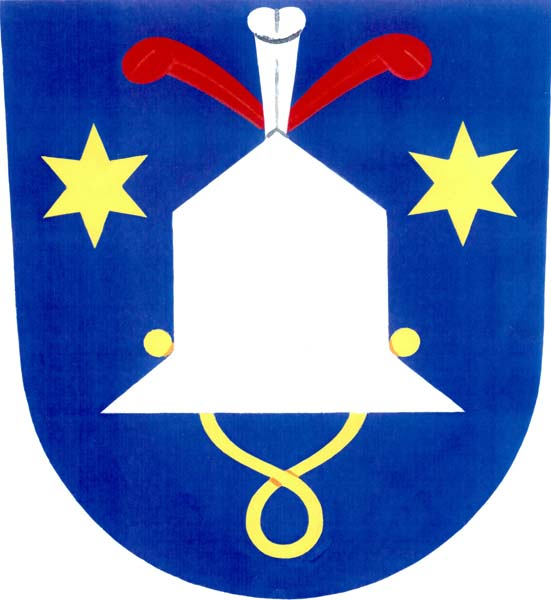 Znak obce Cetkovice